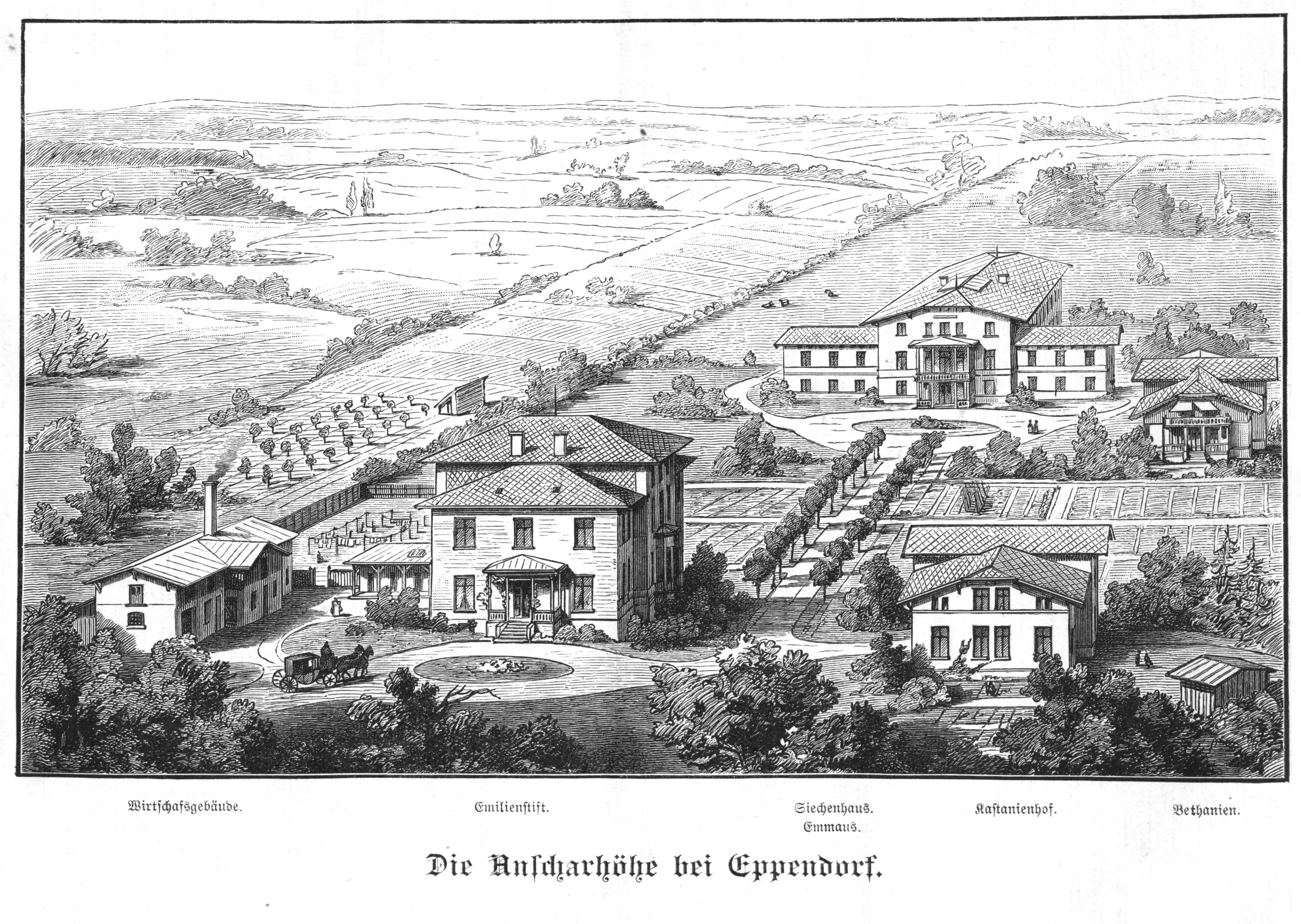 Die Anscharhöhe bei Eppendorf 1886 mit Wirtschaftsgebäude, Emilienstift, Siechenhaus Emmaus, Kastanienhof und Bethanien.